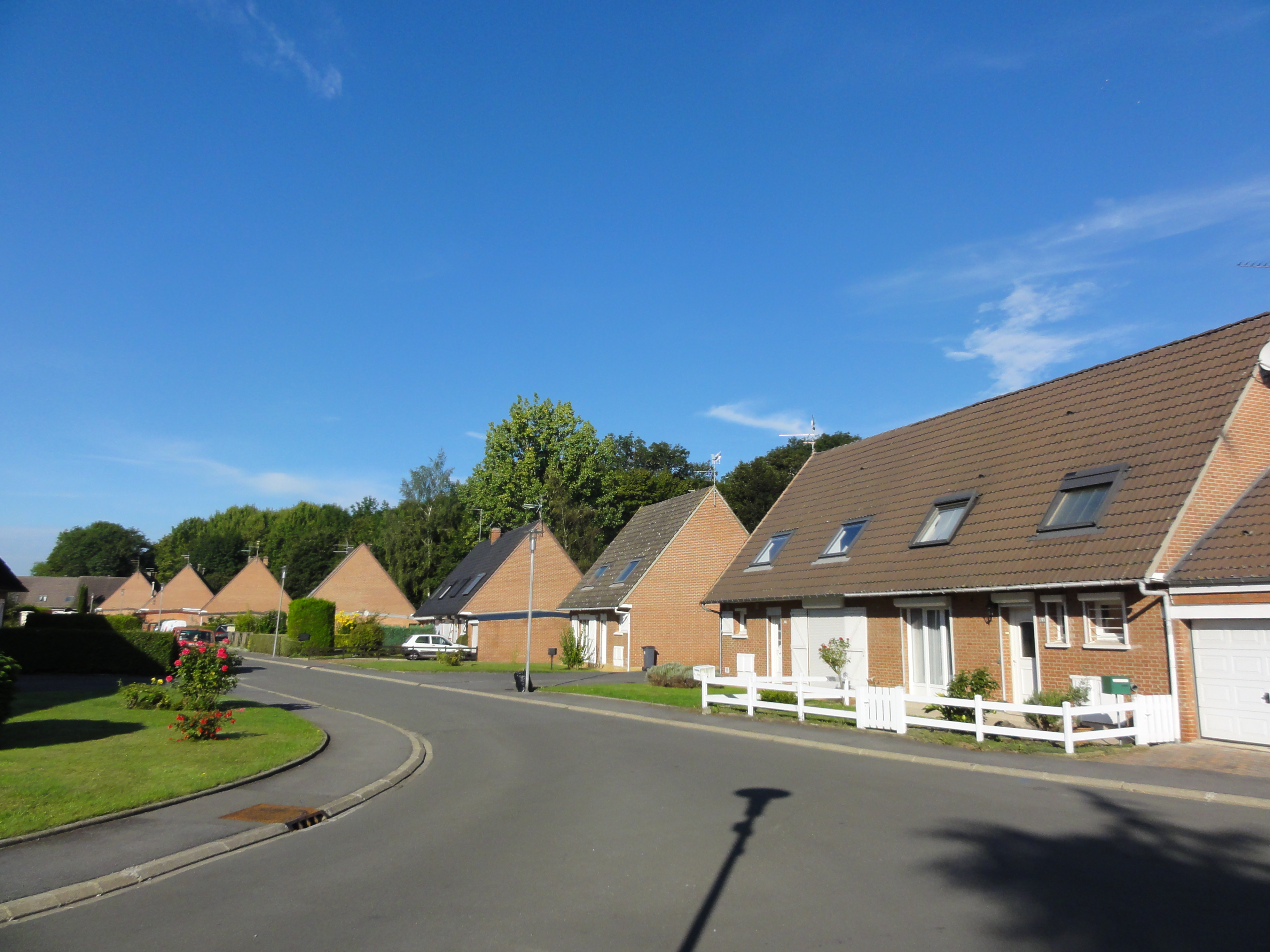 Terril n° 66 dit 11 de Nœux, disparu, fosse n° 11 de la Compagnie des mines de Nœux dans le bassin minier du Nord-Pas-de-Calais, Fouquières-lès-Béthune et Béthune, Pas-de-Calais, Nord-Pas-de-Calais, France.